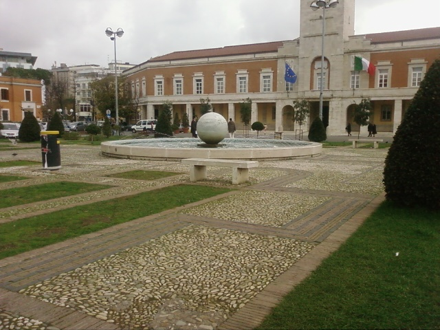 La Fontana della Palla e i giardini di Piazza del Popolo